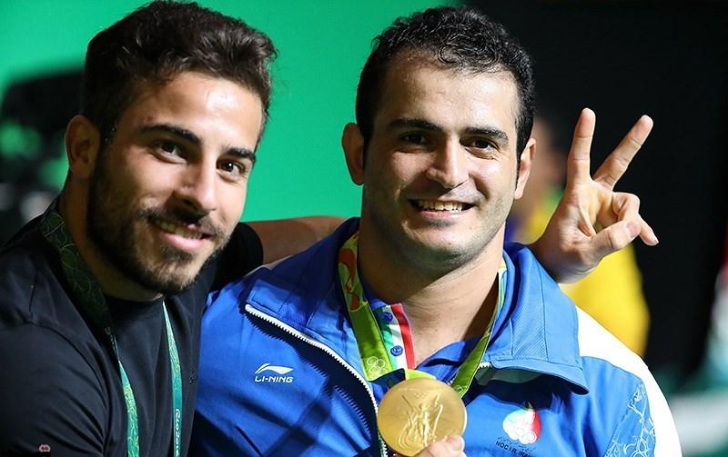 وزنه‌برداری در بازی‌های المپیک تابستانی ۲۰۱۶ – ۹۴ کیلوگرم مردان